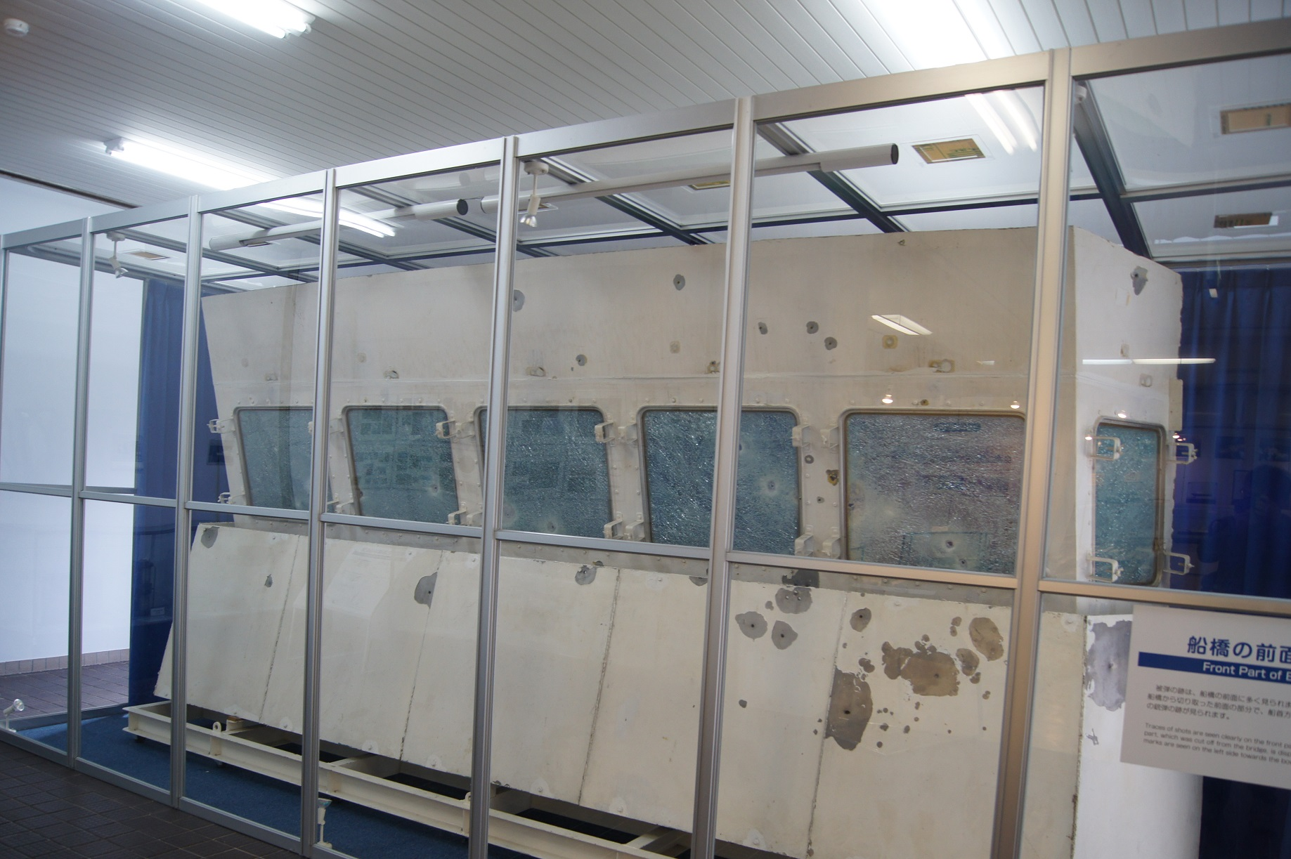 九州南西海域工作船事件で銃撃をうけ、損傷したja:あまみのja:艦橋。（海上保安大学校資料館にて撮影）